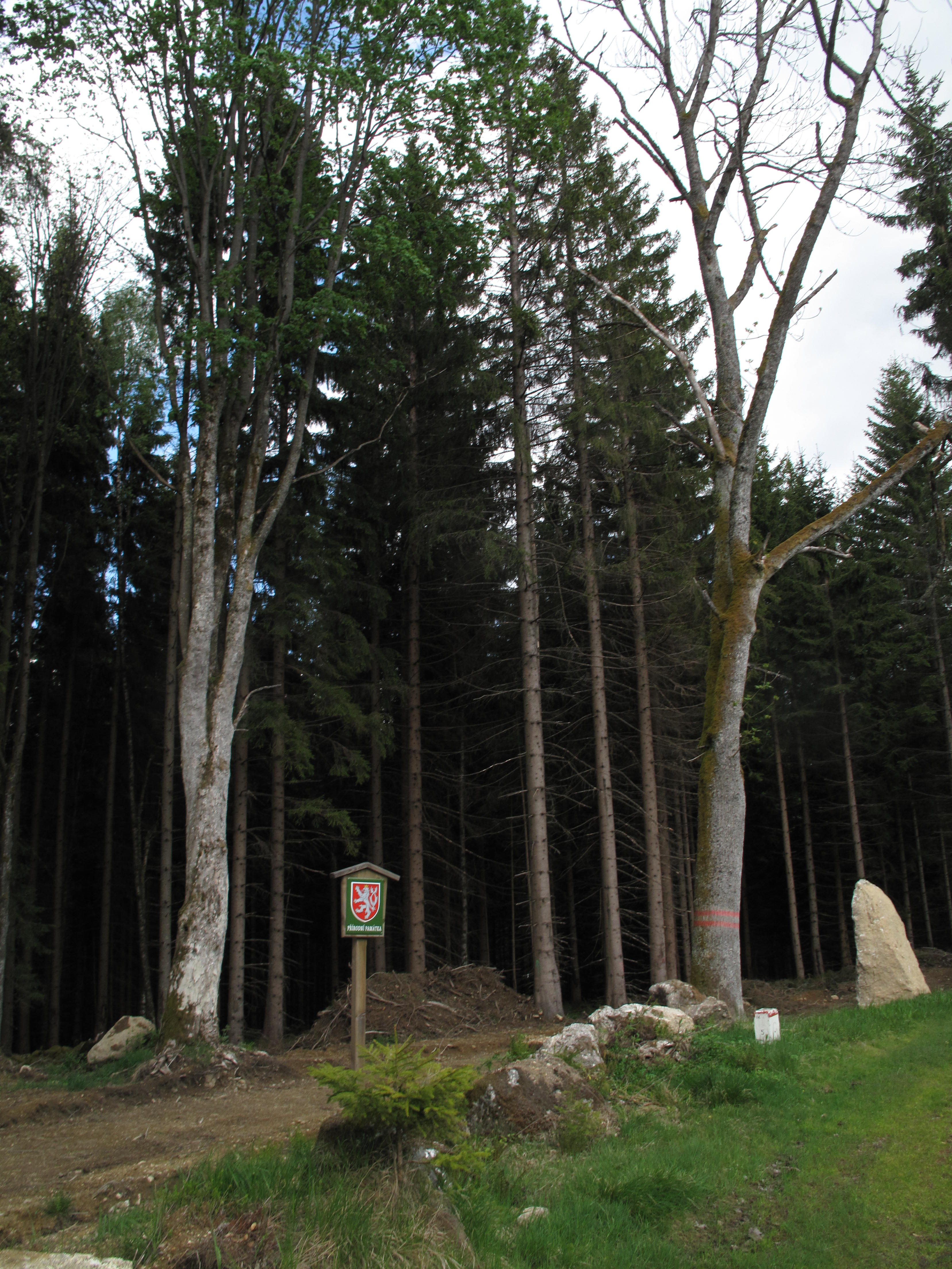 Stodůlecký vrch